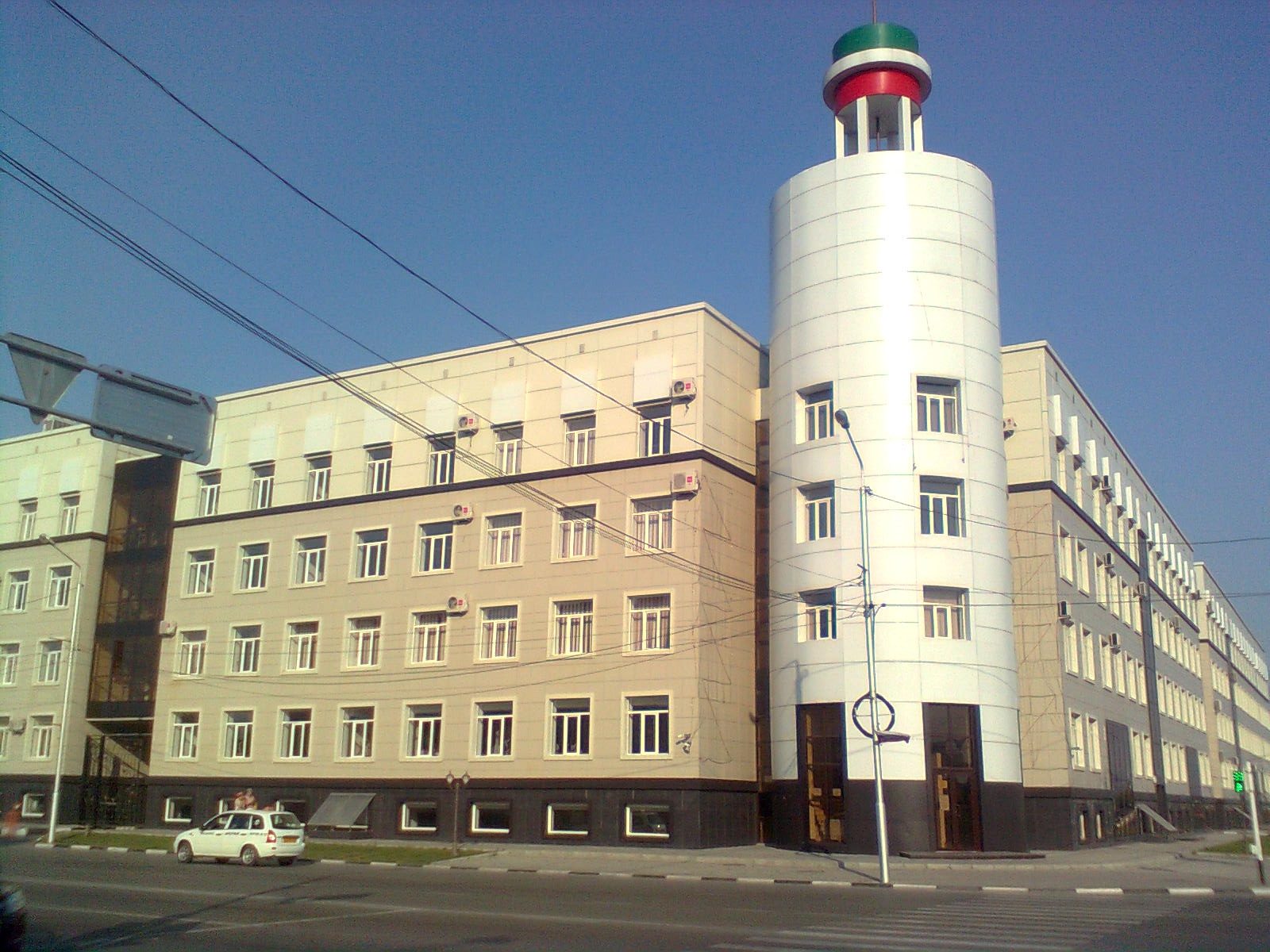 Грозненский нефтяной университет